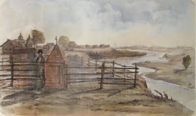 Беларуская (тарашкевіца): Рагачоў (Rahačoŭ), рака Дняпро (Dniapro)